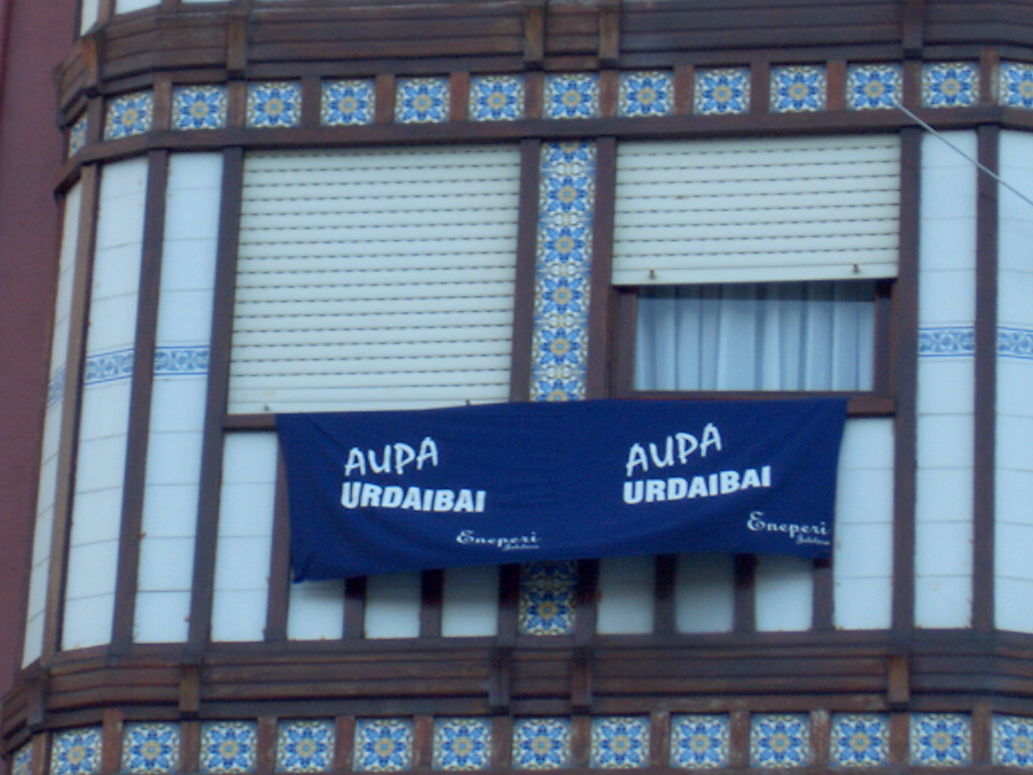 Urdaibai arraun elkarte animatzeko bandera